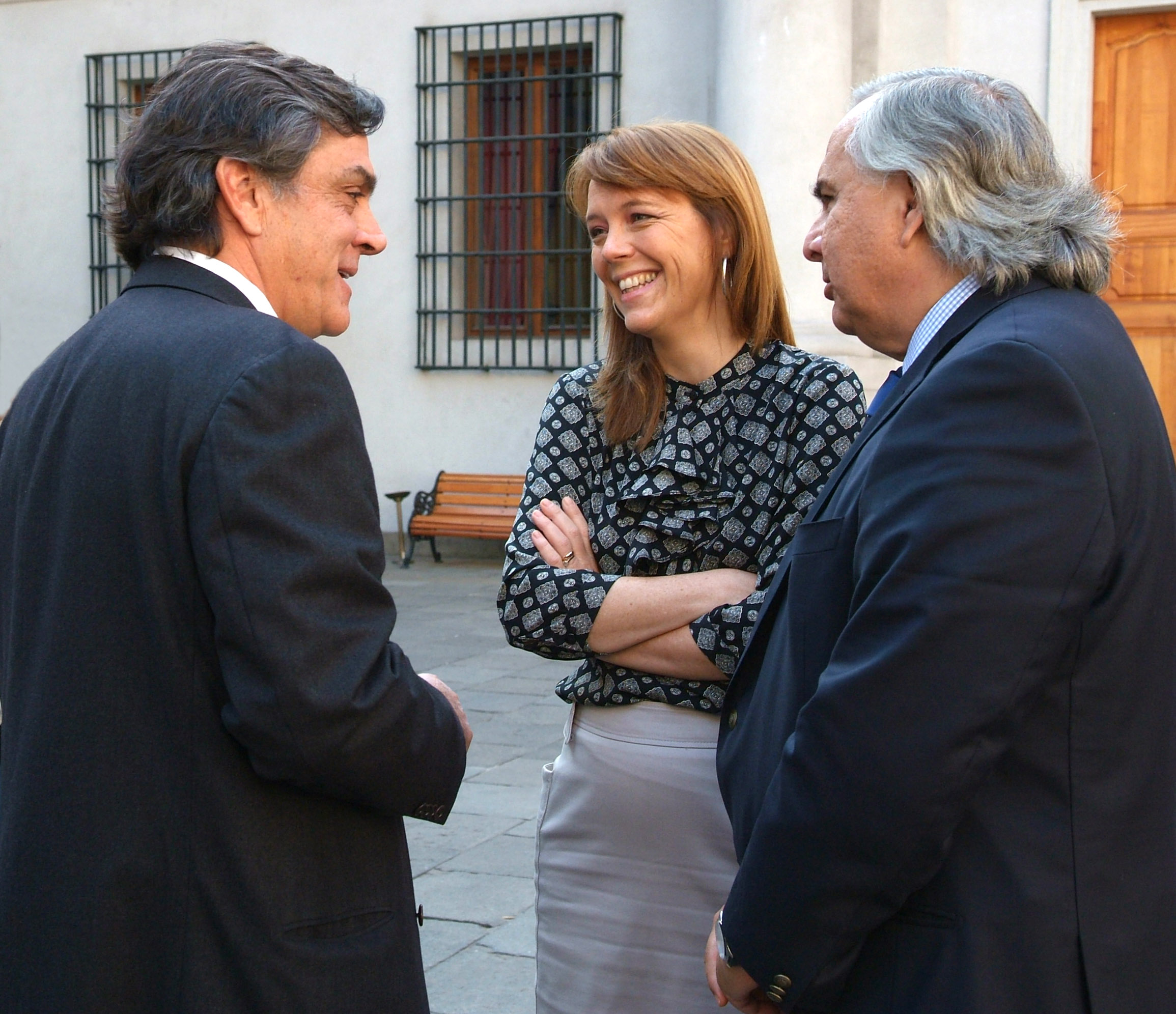 La Ministra Secretaria General de Gobierno,Ena von Baer,junto a los Senadores Pablo Longueira y Andrés Chadwick. Palacio de La Moneda.